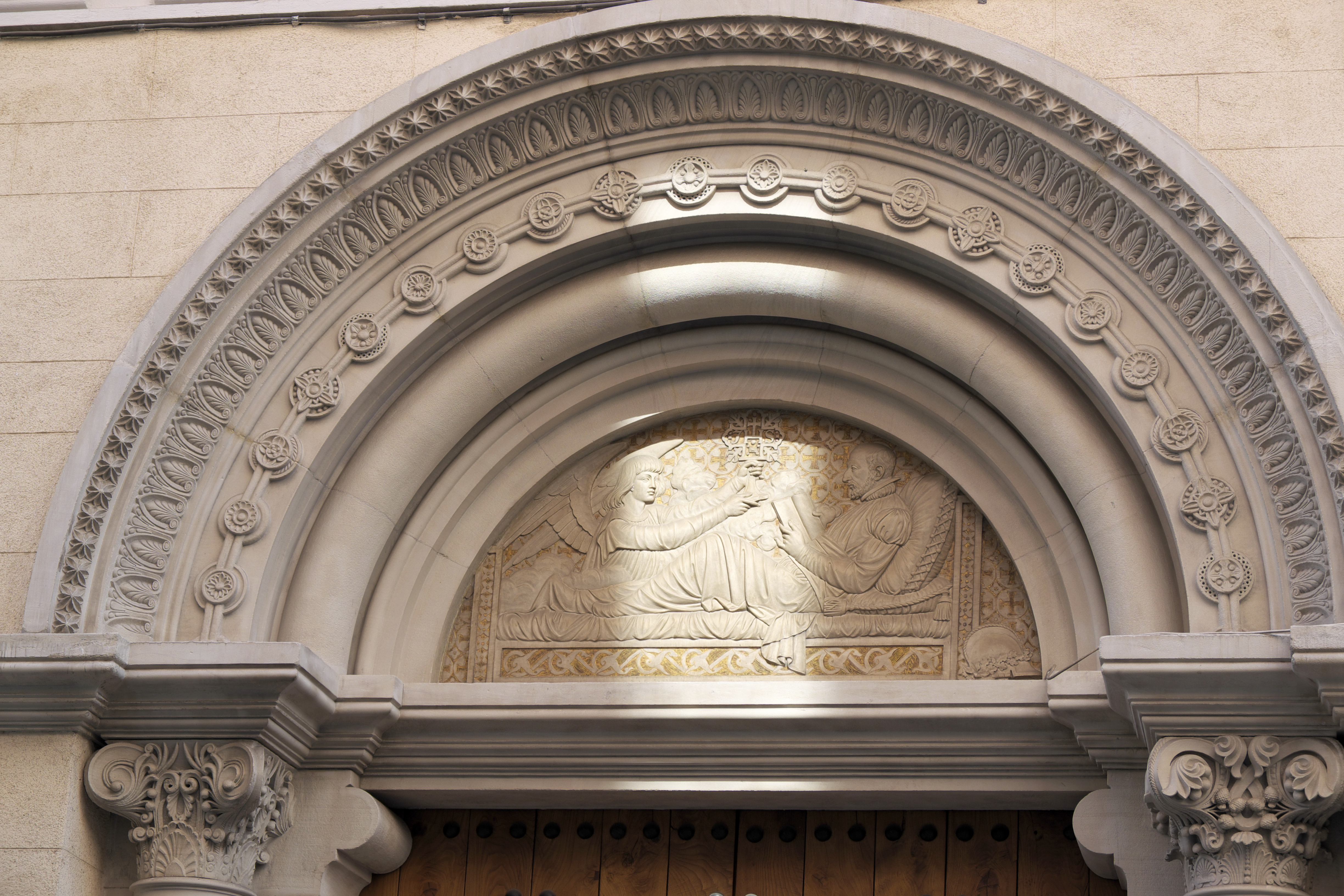 Gebäude in der Calle del Príncipe in Madrid (Spanien), Tympanon mit Relief